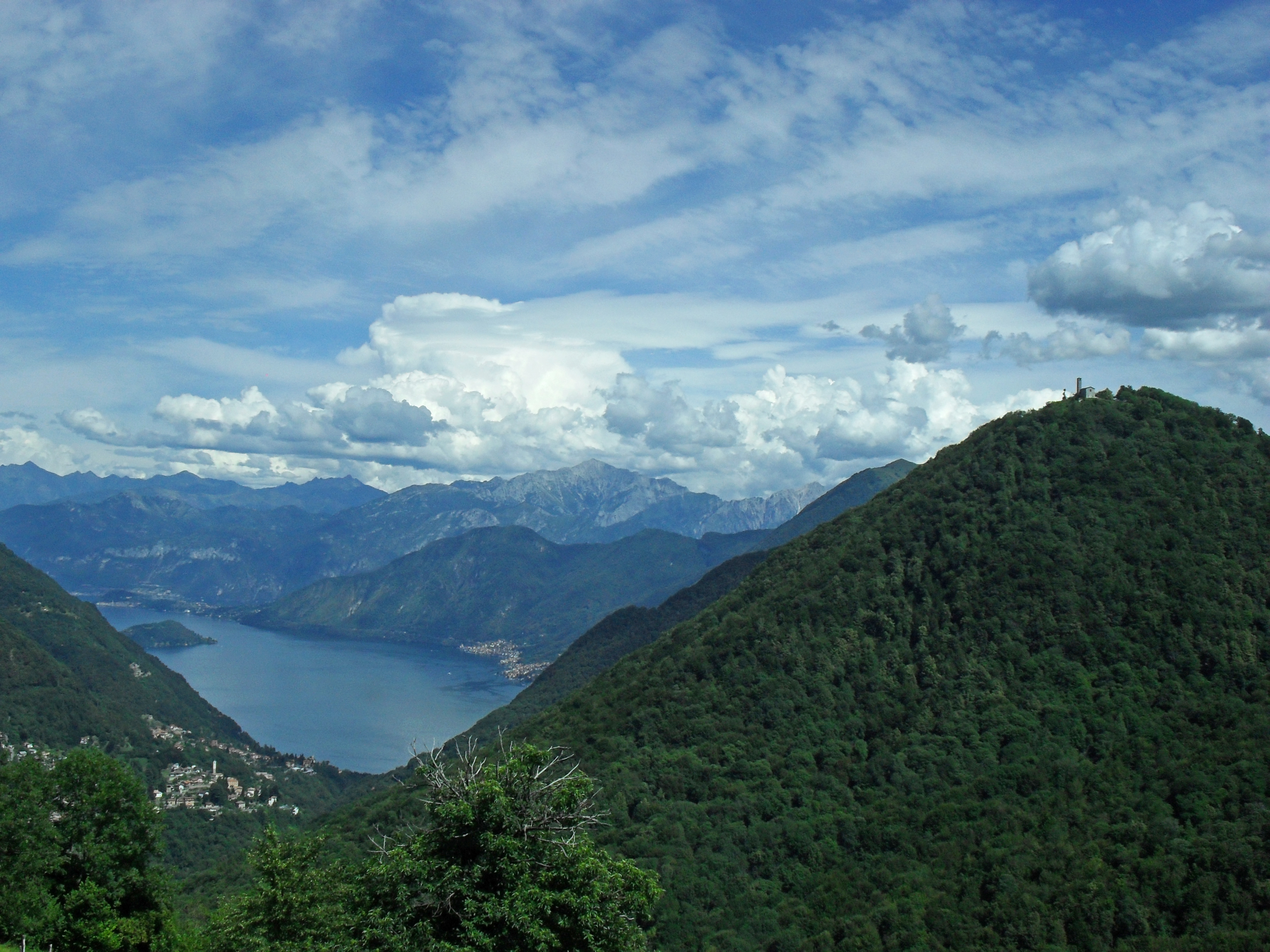 Comer See und Monte San Zeno (rechts).